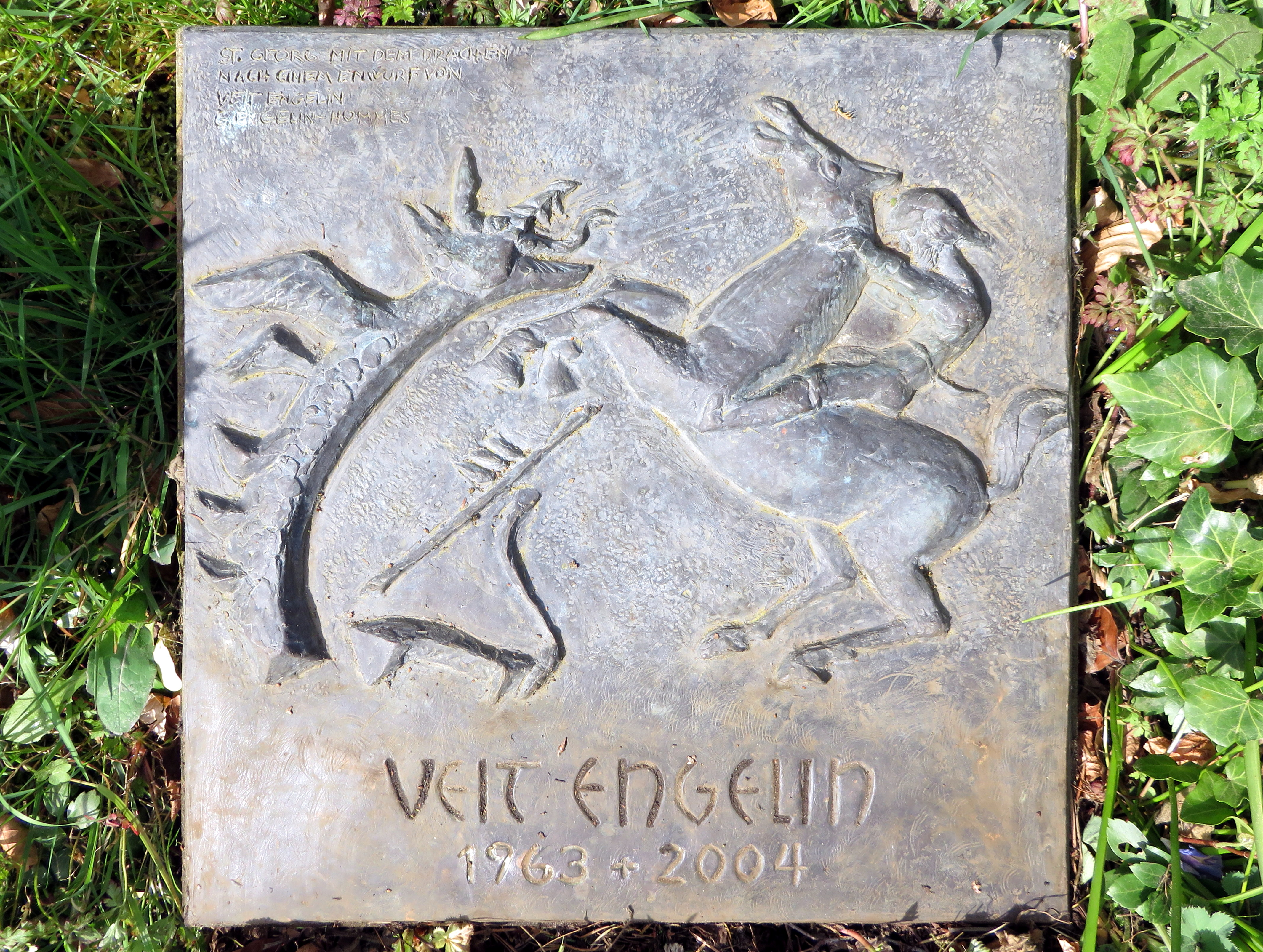 Grabstein des deutschen Bildhauers Karl Heinz Engelin, Friedhof Ohlsdorf, Planquadrat Bh54-1985 (südlich T-Teich, westlich Freilichtmuseum Heckengarten). Es handelt sich um einen etwa 40 x 40 cm großen Bronze-Kissenstein mit reliefartiger Andeutung seiner Skulptur „Der Faulenzer“ (1984), ihm zu Ehren von seiner Ehefrau, der deutschen Bildhauerin Gisela Engelin-Hommes (geboren 1931) gestaltet mit der Inschrift „Gisela Engelin-Hommes 1987 nach KH Engelin". Unmittelbar daneben befindet sich ein Kissenstein ähnlicher Art für Veit Engelin 1963-2004“, ebenfalls von „G. Engelin-Hommes“ mit der Gravur: „St. Georg mit dem Drachen nach einem Entwurf von Veit Engelin“.